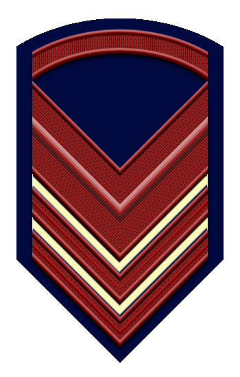 Italian Airforce rank Primo Aviere Capo Scelto